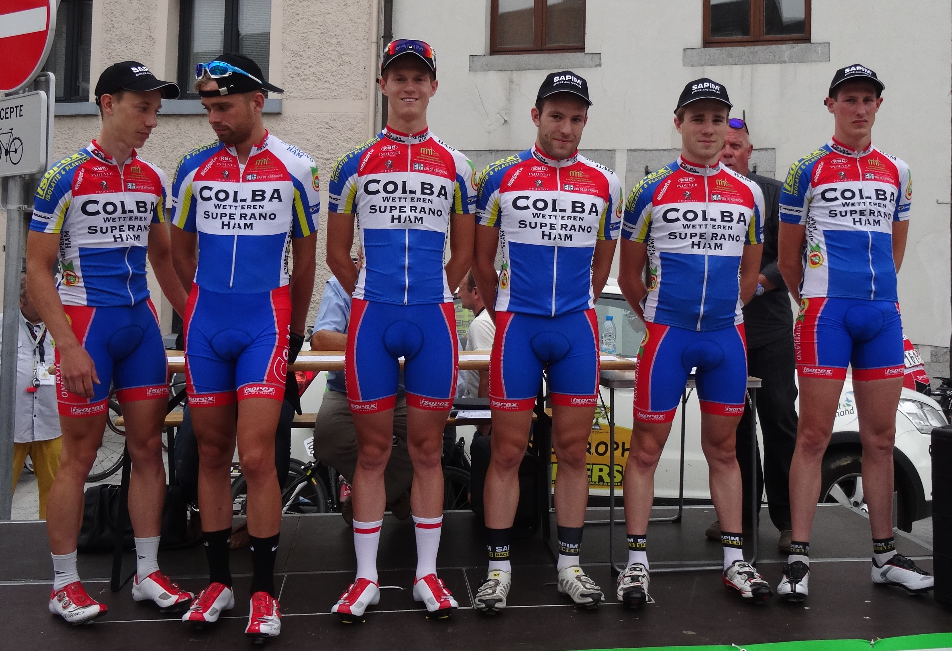 Reportage photographique réalisé le mercredi 6 août à l'occasion du départ de la première étape du Tour de la province de Namur 2014 à Jambes (Namur), Belgique.